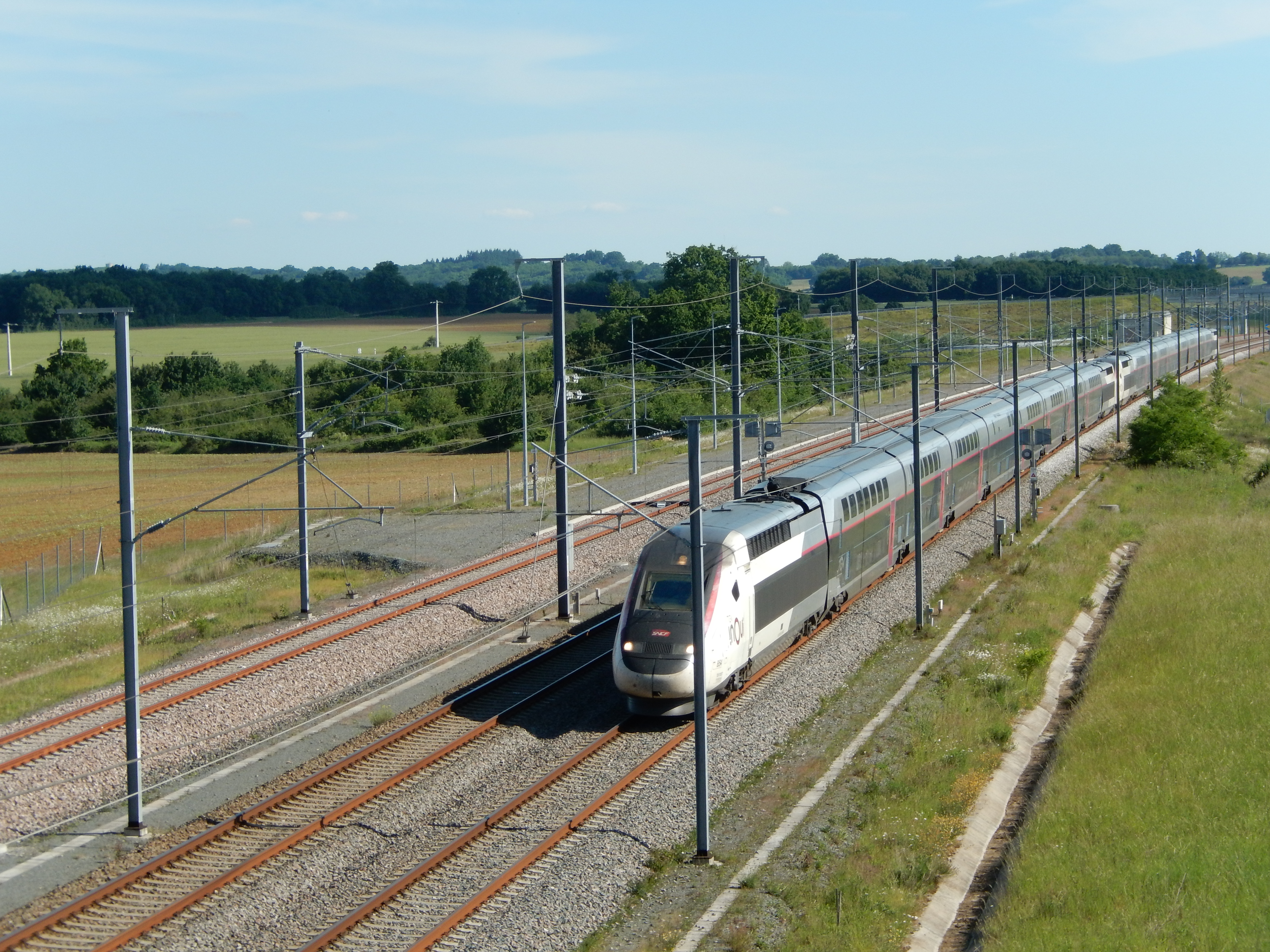 La ligne ferroviaire à grande vitesse Sud-Europe-Atlantique, à hauteur de Pliboux, dans les Deux-Sèvres. Un TGV en direction de Paris est visible sur l'image.